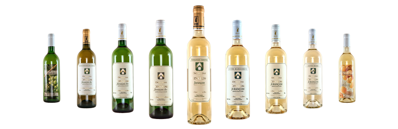 Cuvées du Domaine du Cinquau (Jurançon et Jurançon Sec)